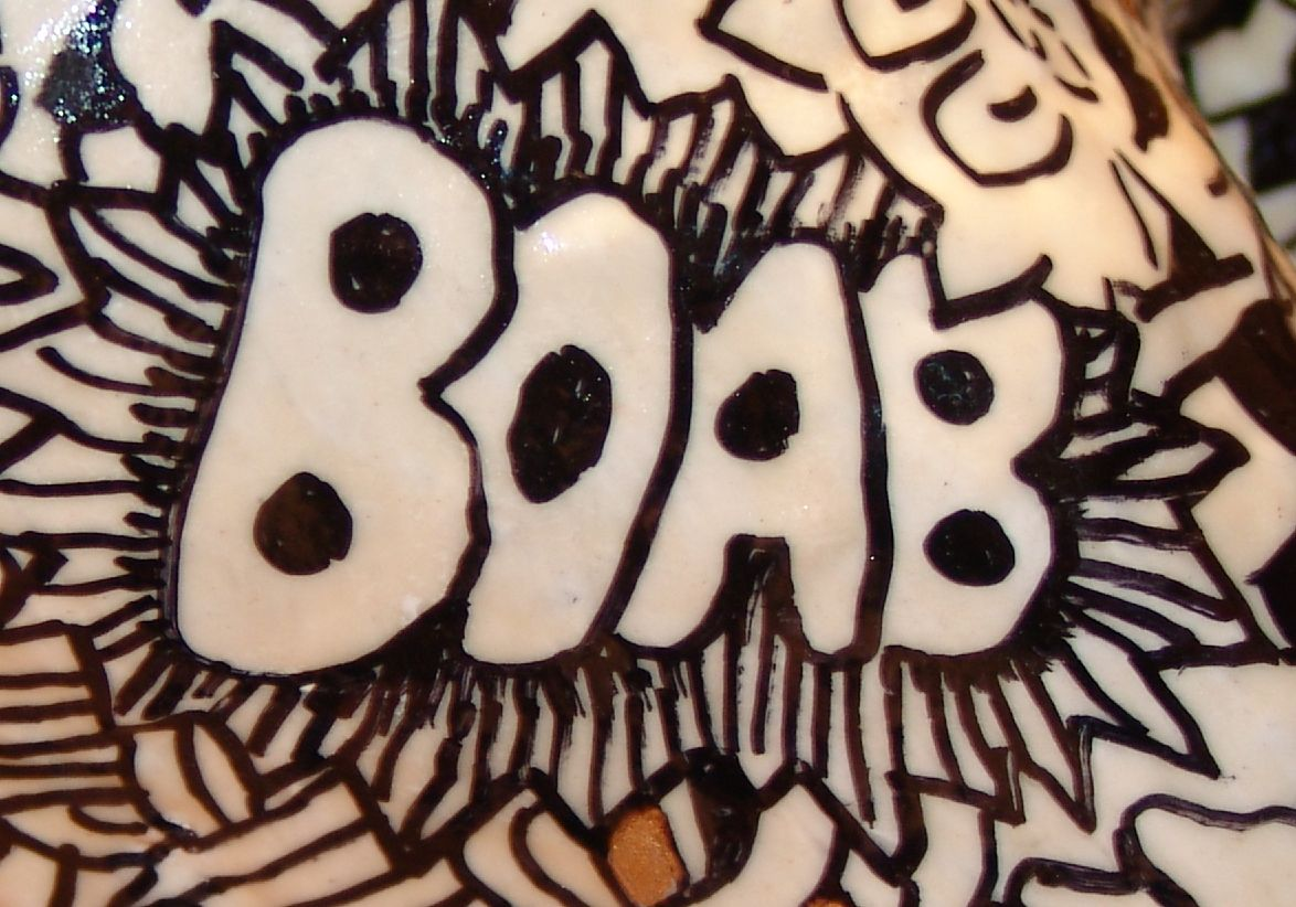 Boab es el termino definitorio de un estilo artístico creado por dos aragoneses, Pedro Bosco 1963 Barbastro (Huesca) España y Javier Ábrego 1965 (Zaragoza) España. Su técnica consiste en la creación de esculturas figurativas e irrealistas, término este último acuñado por Pedro Bosco. Estas esculturas son además tatuadas consiguiendo un efecto en donde se mixtionan escultura, dibujo y pintura a la vez, de este modo los trabajos puede ser contemplados tanto su estética morfológica, pictórica así como el trazo del dibujo en formas tatuadas sobre la pieza. Esta práctica artística nace bajo el enfoque de la obra de Goya de la cual ambos creadores son admiradores e incluso distintos trabajos de ambos han sido influenciados por las ideas creativas de Francisco de Goya como así lo demuestran sus colecciones personales respectivas de pinturas y esculturas. El proyecto común de Bosco y Ábrego es perenne como así lo demuestran la formula productiva de los trabajos donde el proceso creativo mixto para Boab permite en ambos la libertad creativa de sus trabajos de forma individual. Obras que aún dentro de esa independencia artística conviven en armonía en las exposiciones comunes.